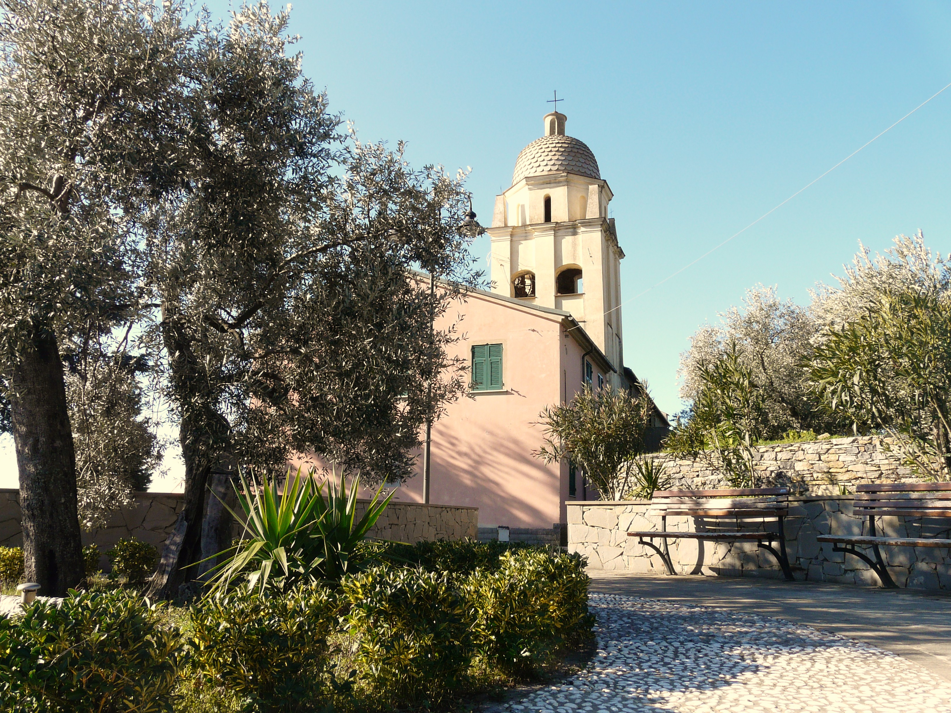 Chiesa di Nostra Signora della Salute, Volastra, Riomaggiore, Cinque Terre, La Spezia, Liguria, Italia